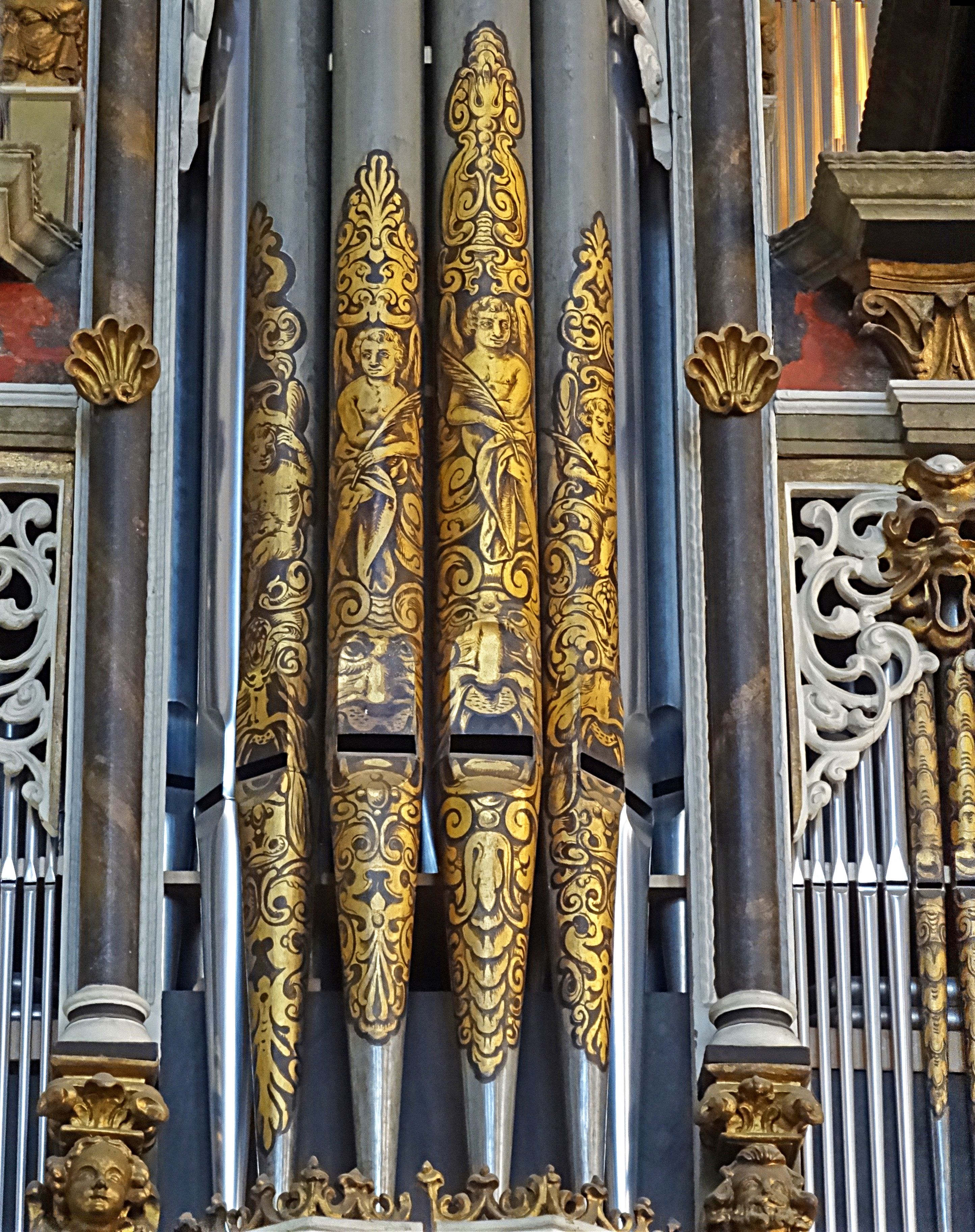 Details der Orgel in der Michaeliskirche Erfurt, einem Orgelneubau (1896 Friedrich Petersilie und 2000 W. Rühle & Sohn) im Gehäuse von Ludwig Compenius (1652).